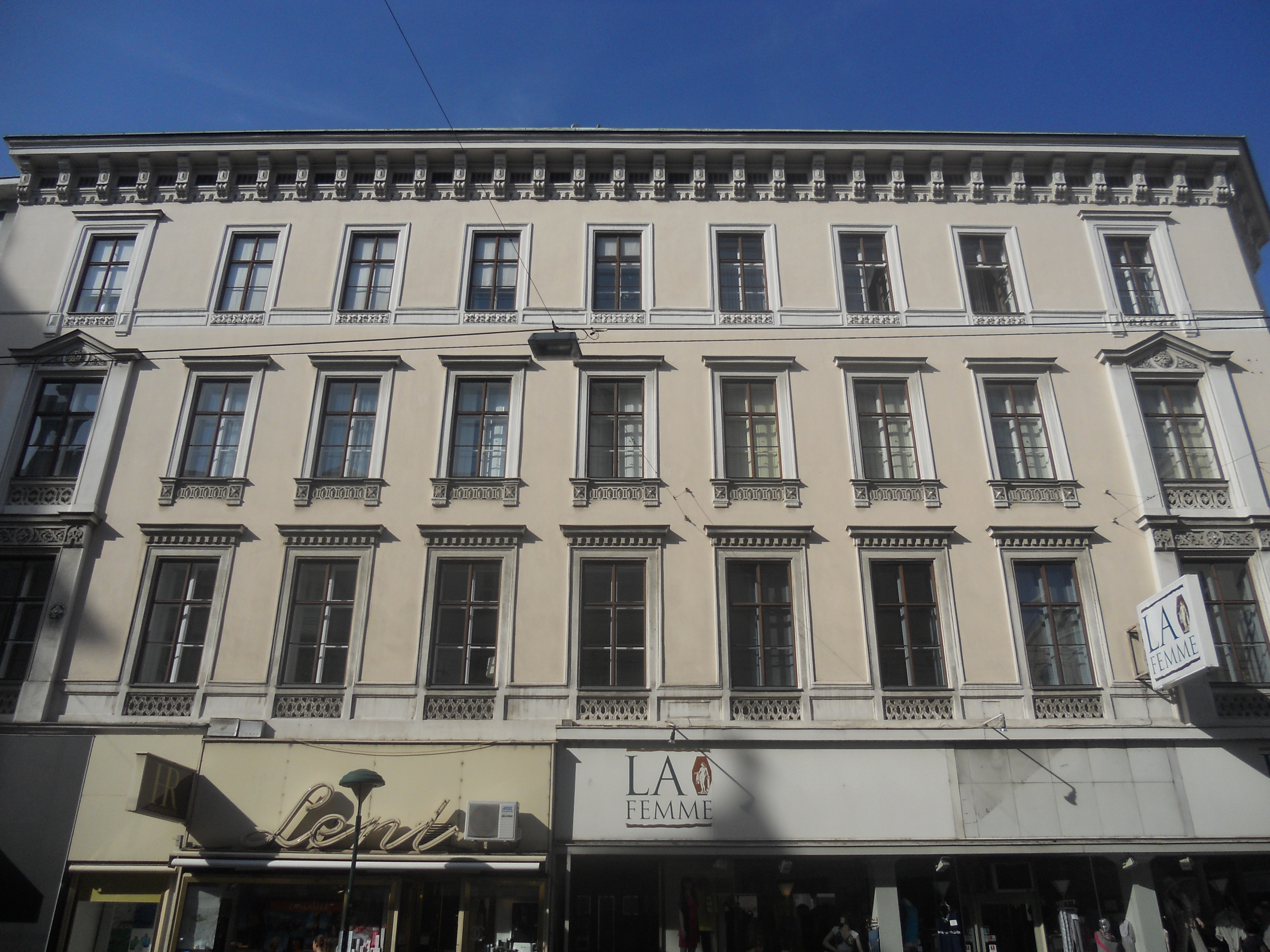 Haus Landstraßer Hauptstraße 13 in Wien